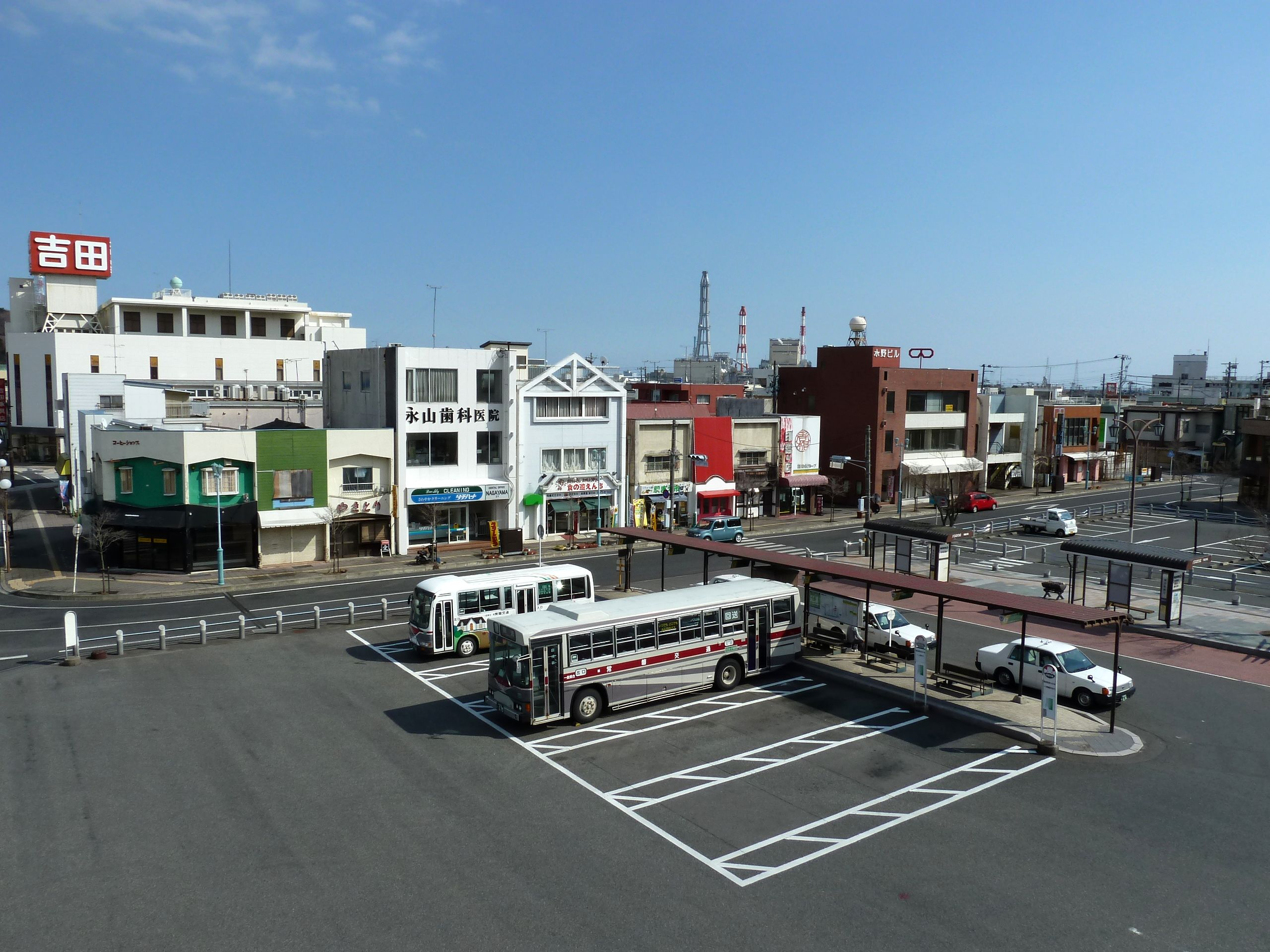 常磐線 植田駅前